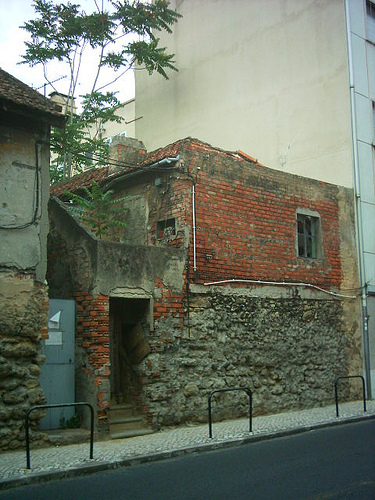 Edifício original em Moscavide.